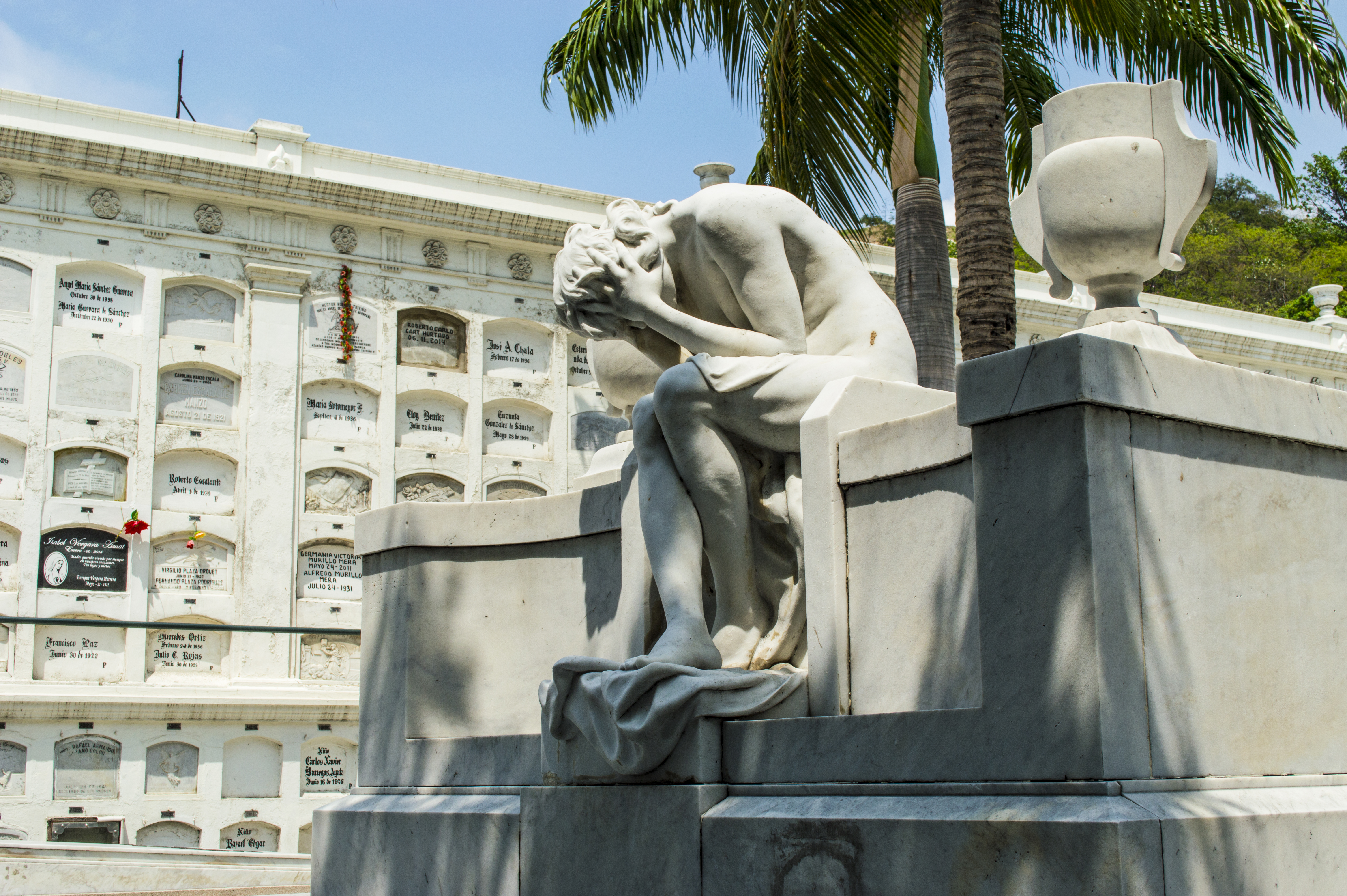 Tumba del Conde Mendoza detalle tres cuartos